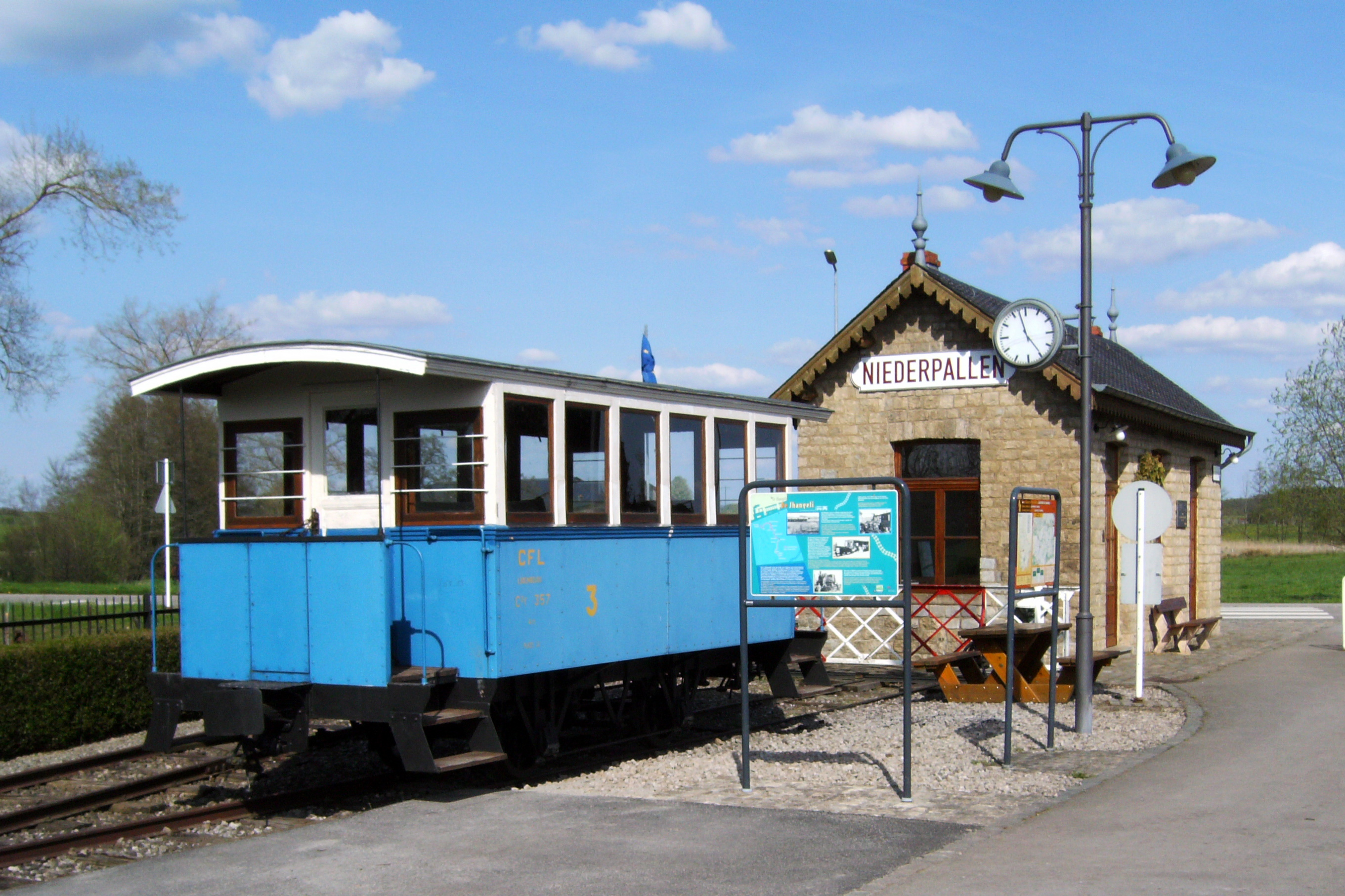 chemin de fer à voie étroite Jhangeli à Niederpallen